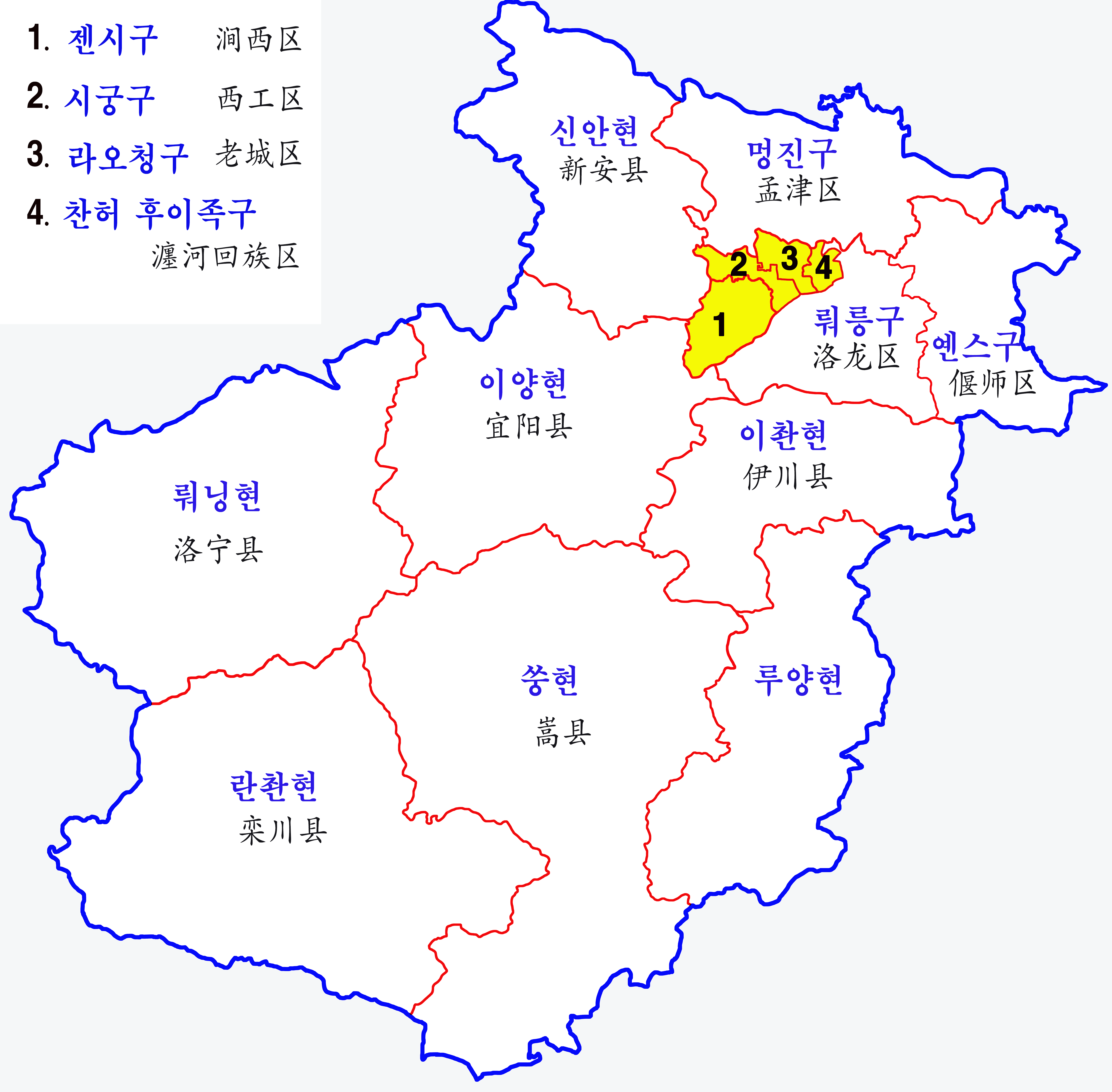 허난성 뤄양시 현급행정구역도